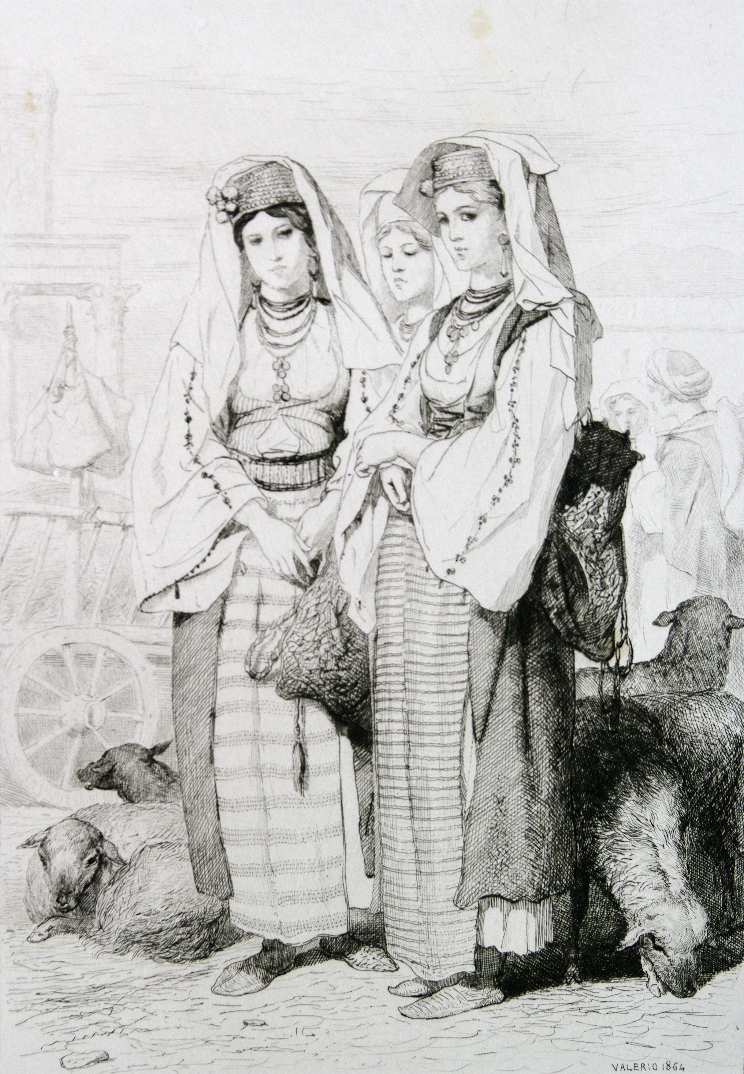 Paysannes Morlaques des environs de Spalato